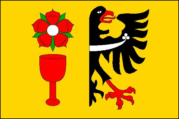 Vlajka obce Supíkovice